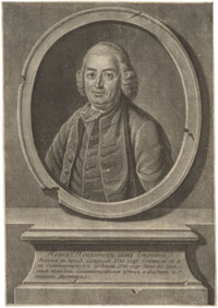 Гравюра Штенглина 1760-х, портрет купца Чиркина И. Р.